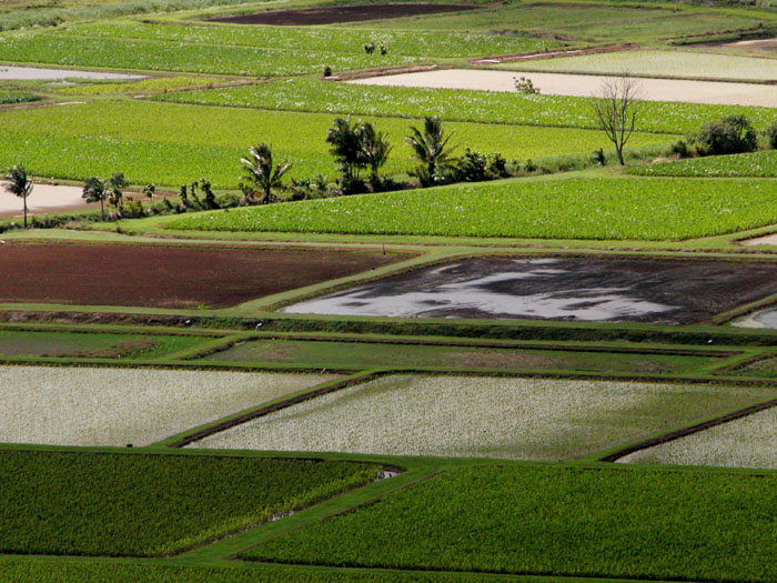 Taro fields, Kauai, Hawaii